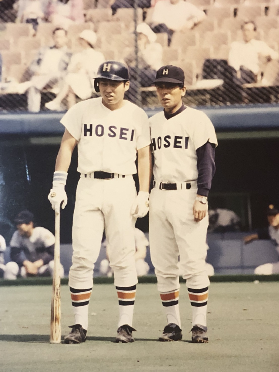 左:1982年 広島ドラフト１位 西田真二 右:鴨田監督